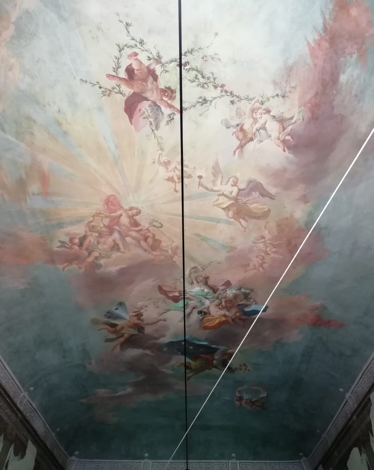 Affresco nella sala dell'Alcova di Villa Rey, Torino